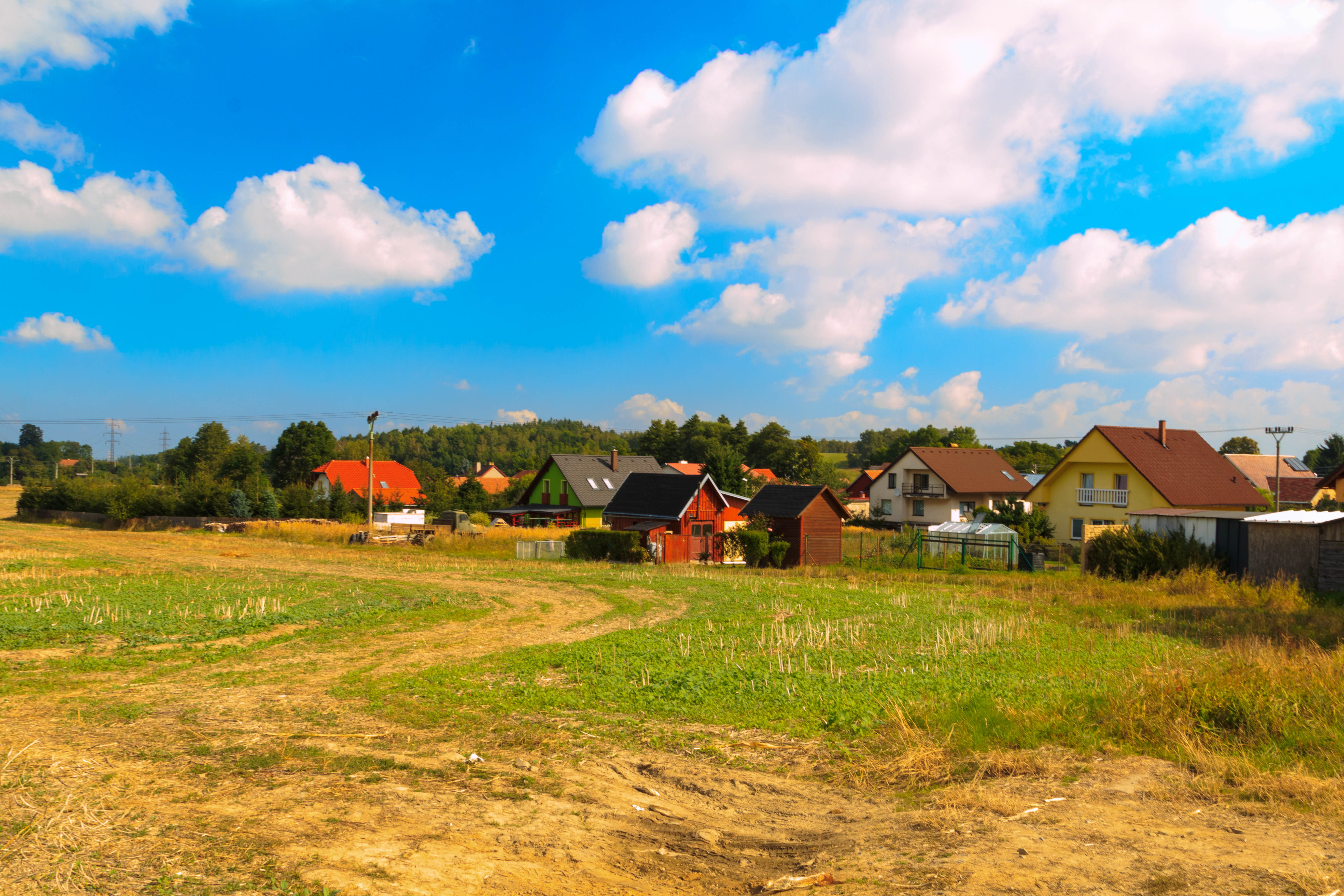 Dolní Holetín